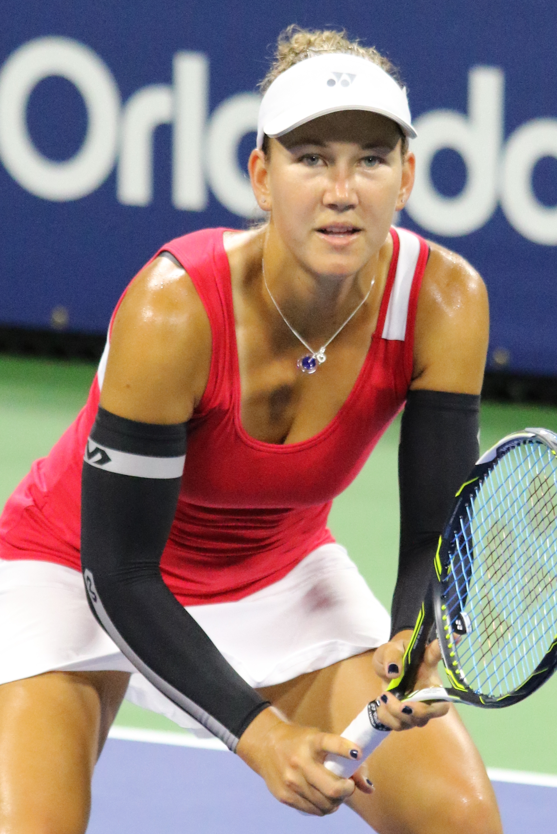 Melichar US16 (5)